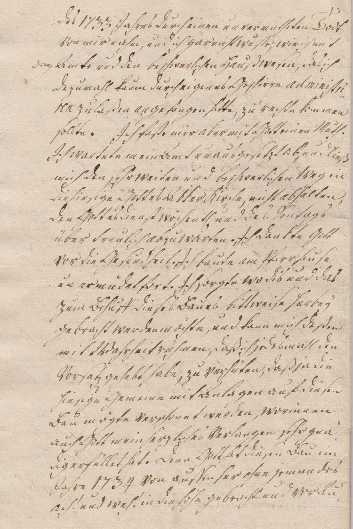 Seite 12 der Leichenpredigt für den Pastor August Wilhelm Reinhart (1696/1770), Bürger der Stadt Heringen an der Helme.